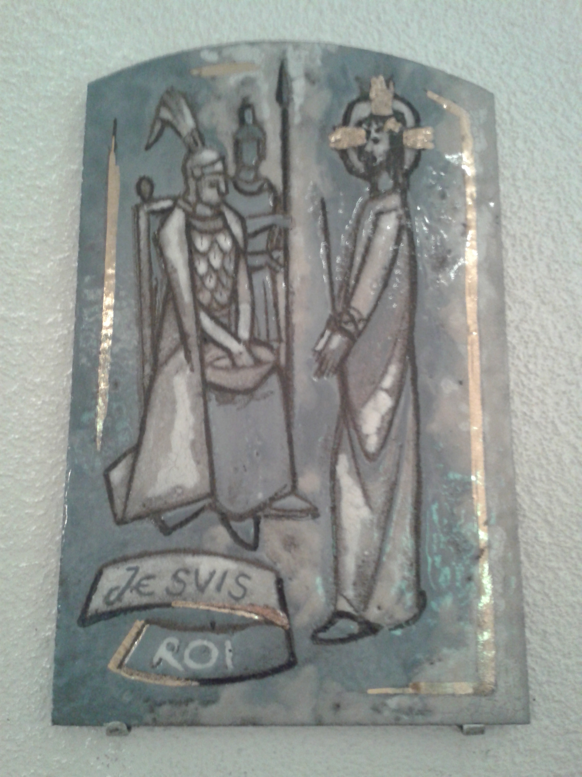 Station 1 : Jésus devant Ponce Pilate (côté aval). Artiste : Jean Parhin